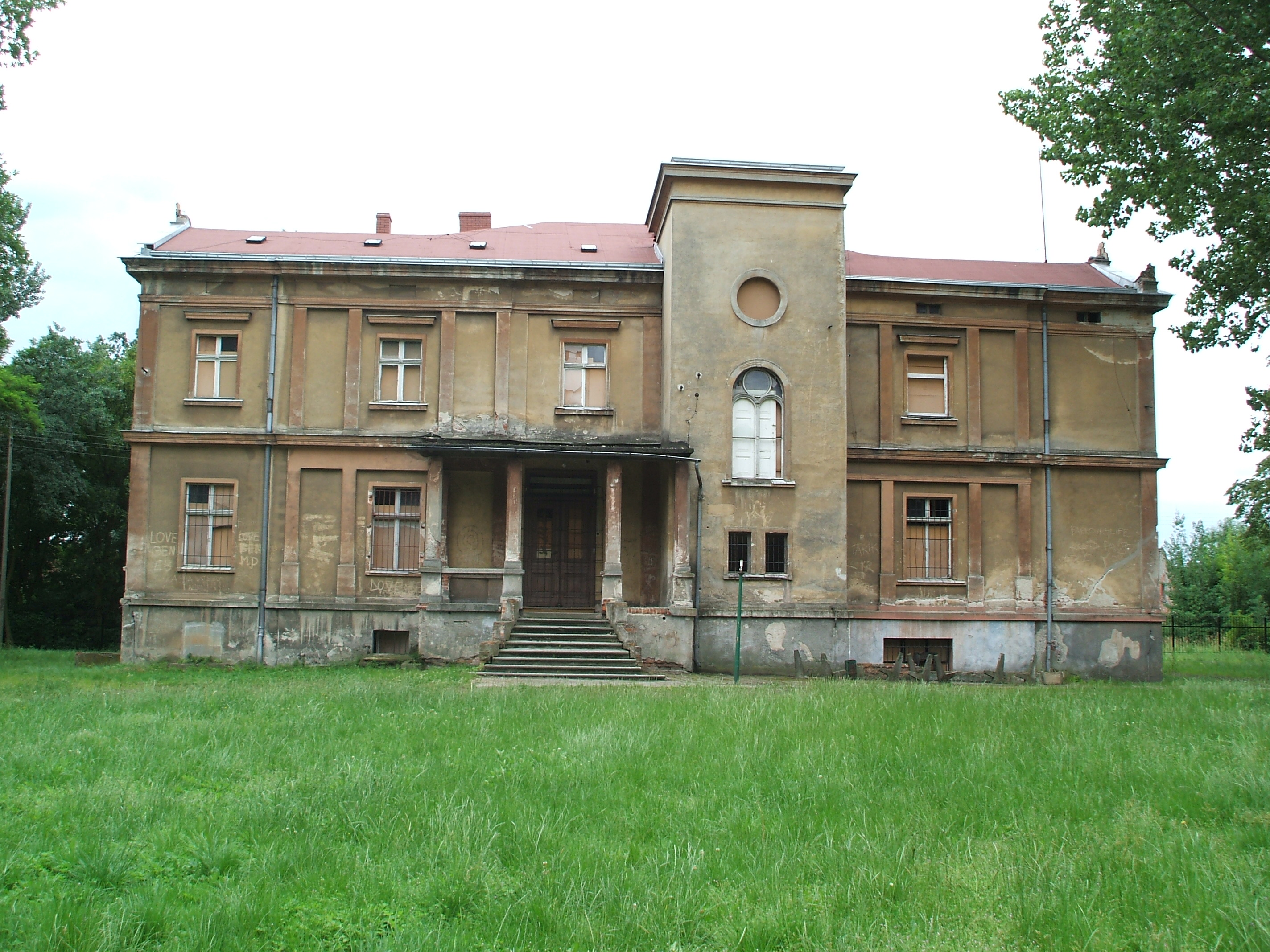 Dwór w Sarnowie - elewacja północna